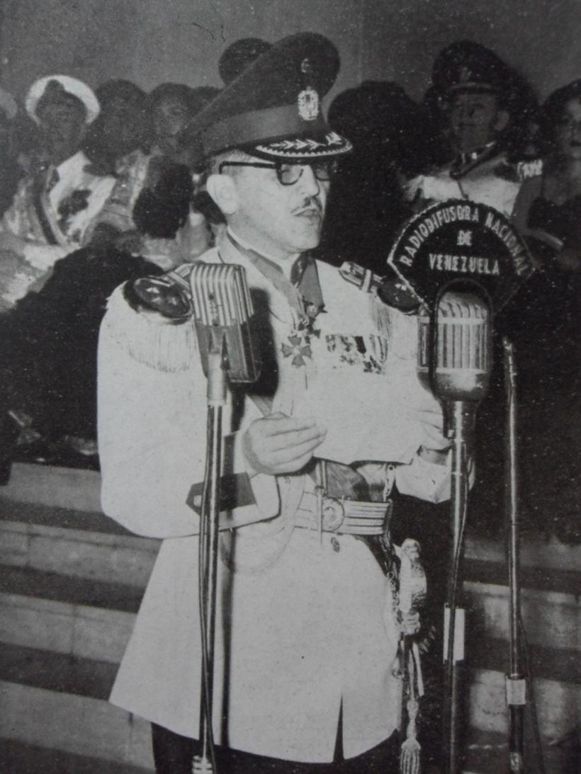 El Coronel Oscar Mazzei, Ministro de la Defensa para 1954, visita el Cuartel Nacional en Valencia para inaugurar el casino de suboficiales y tropas. Foto tomada de Luis Heraclio Medina Canelon.